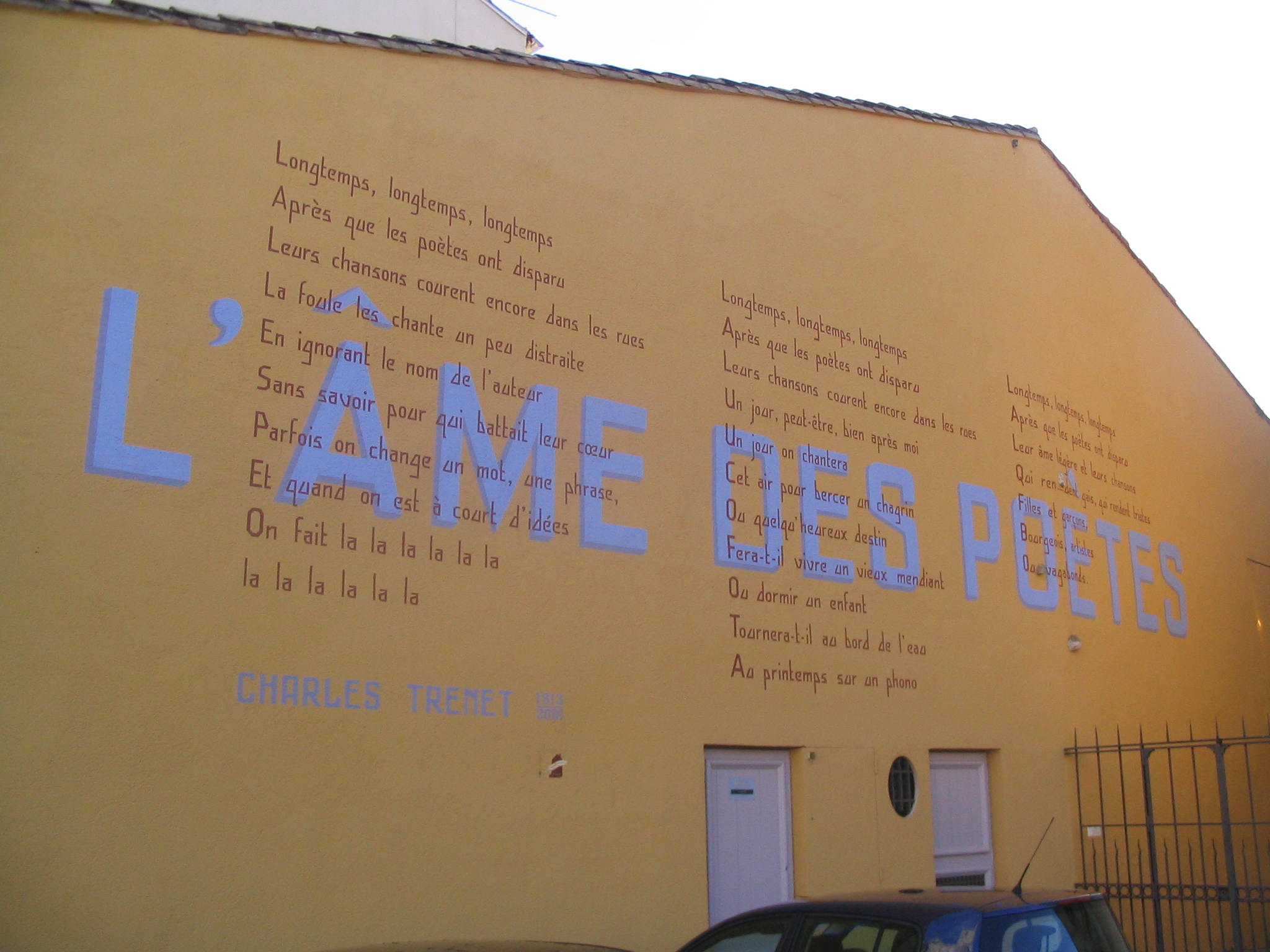 Sur le mur d'une maison de Narbonne, proche de la cathédrale St-Just, figure cette retranscription des paroles de la chanson "L'âme des poètes" interpretée en 1951 par Charles Trenet. Photographie prise personnellement en août 2006.